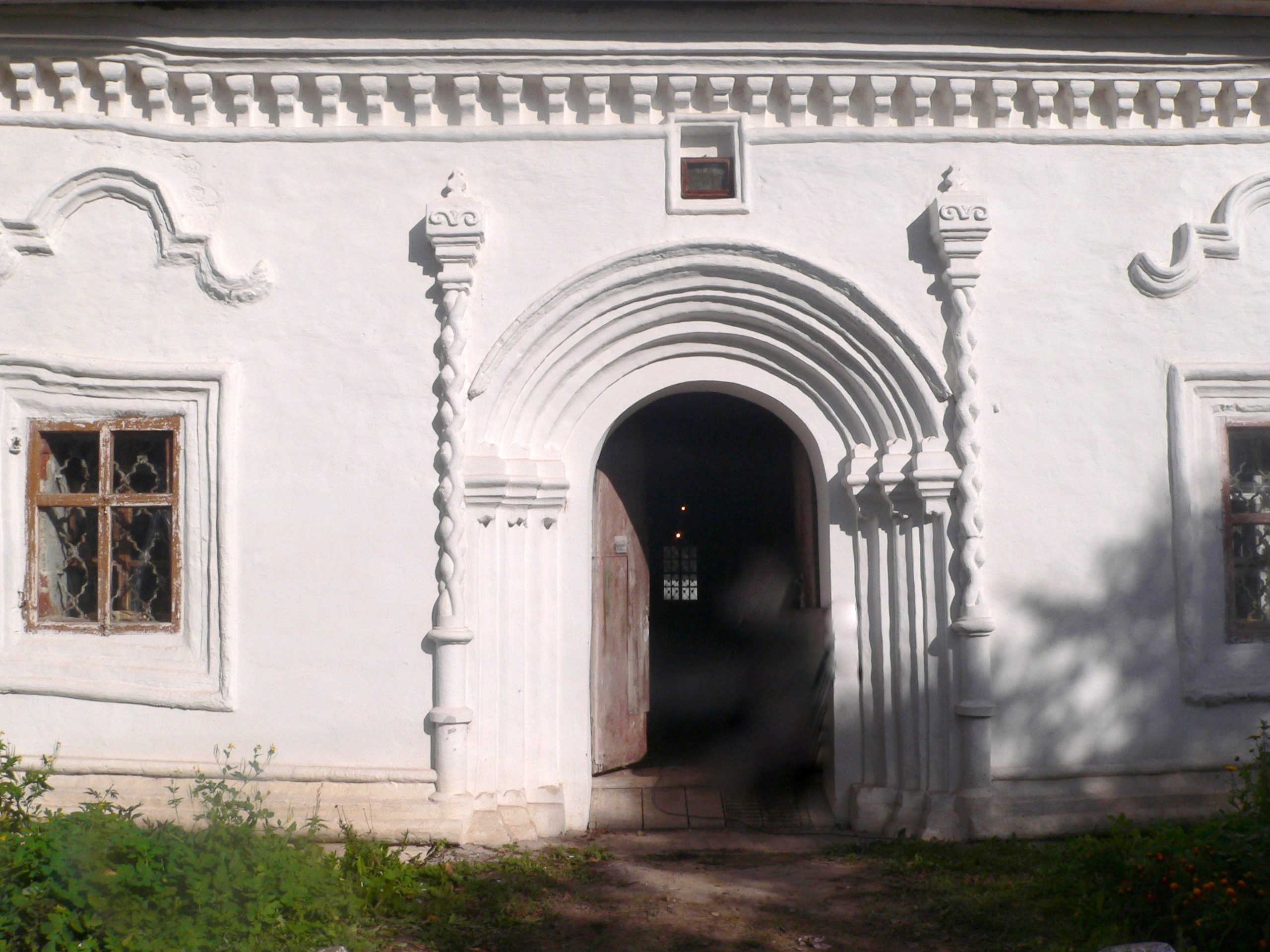 Портал холодной церкви Дмитрия Прилуцкого в Вологде